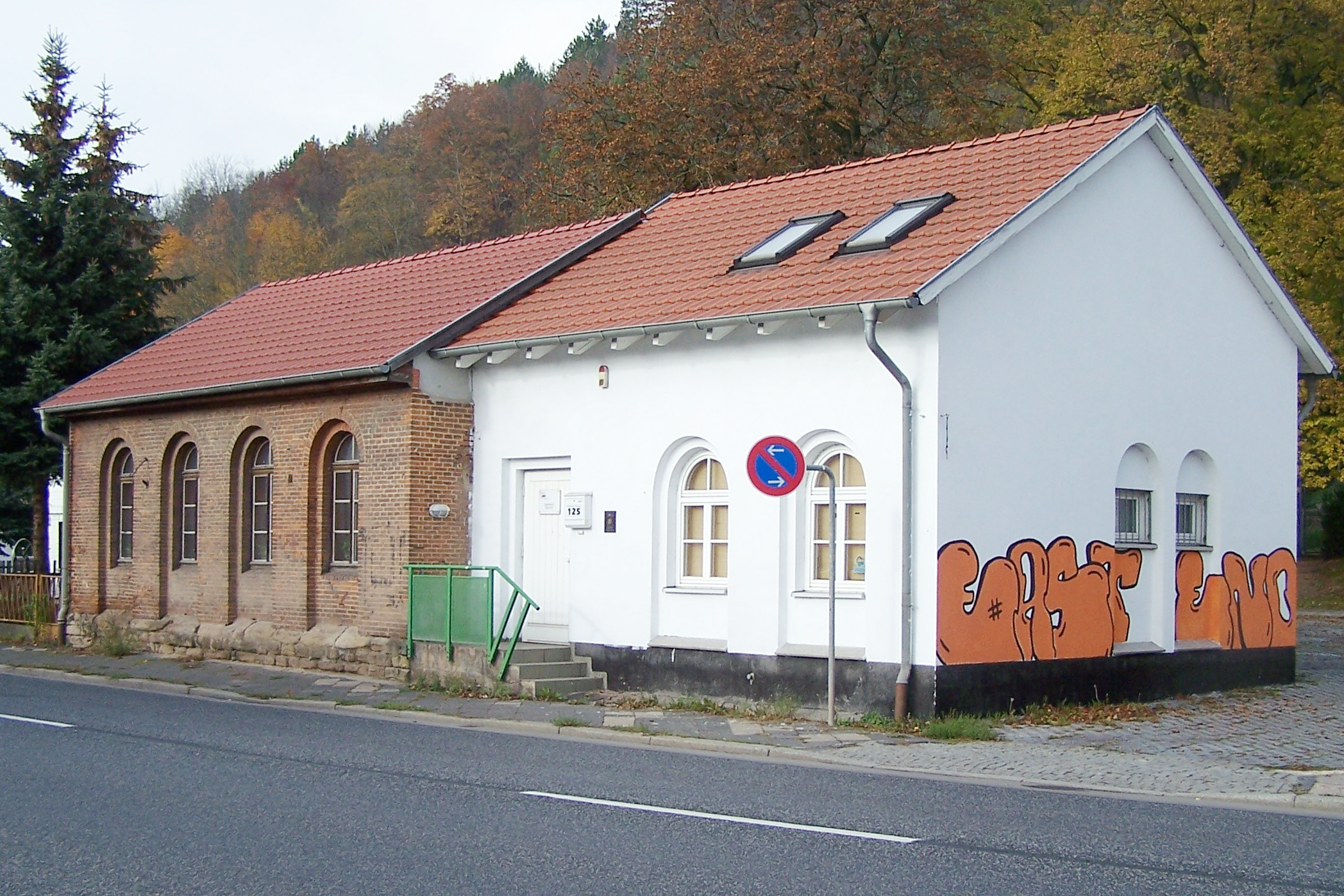 Der Jugendtreff der AWO am östlichen Stadtrand von Eisenach - gegenüber der Stadtbushaltestelle Rothenhof in der Gothaer Straße.